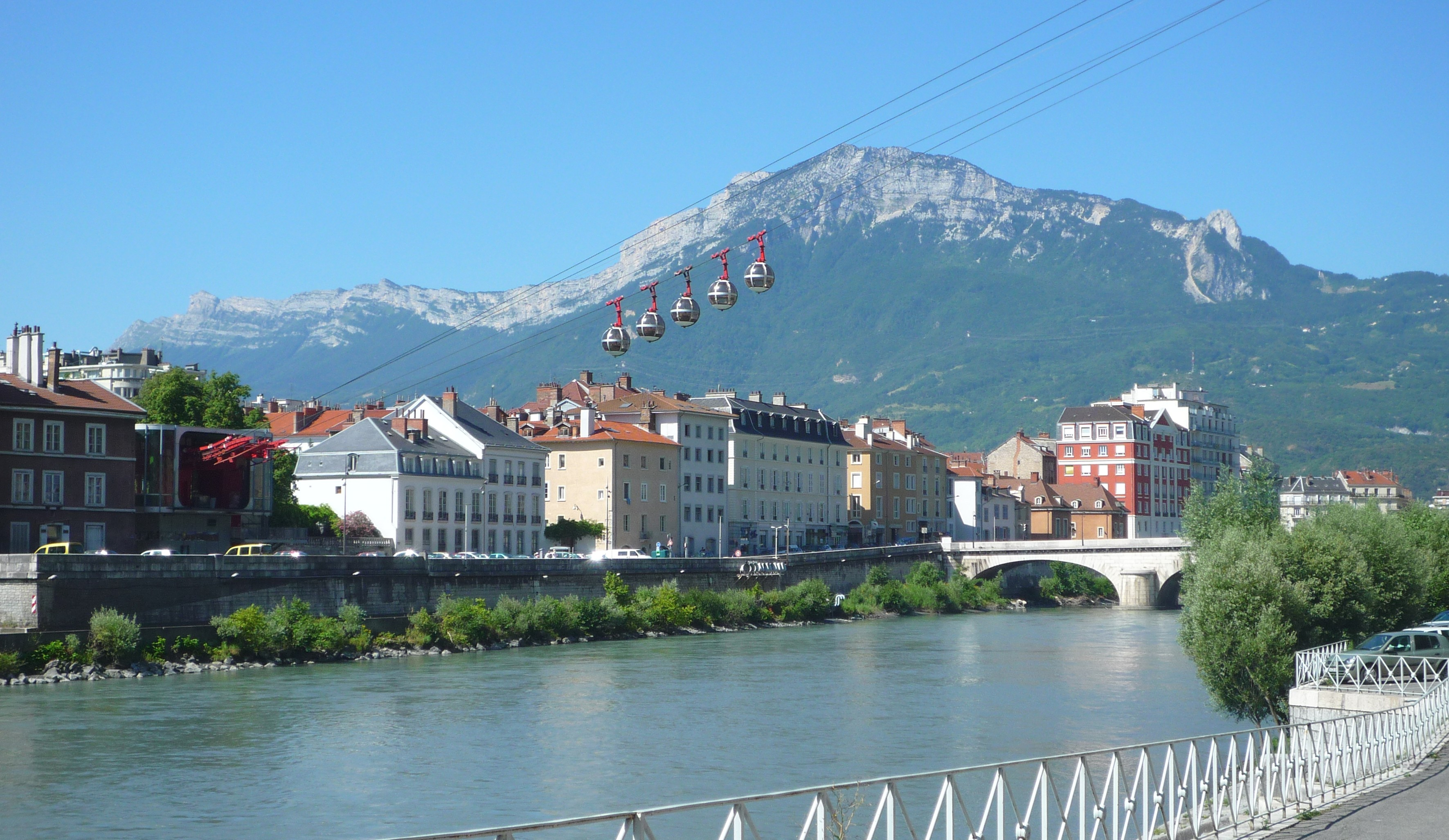 Gare du téléphérique de Grenoble Bastille.